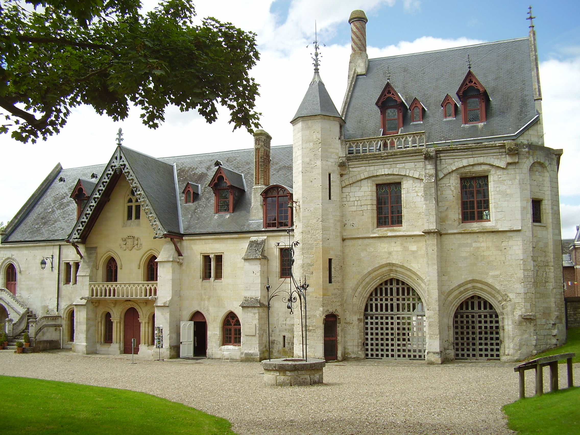 Abbaye de Jumièges, the most beautiful ruins in France